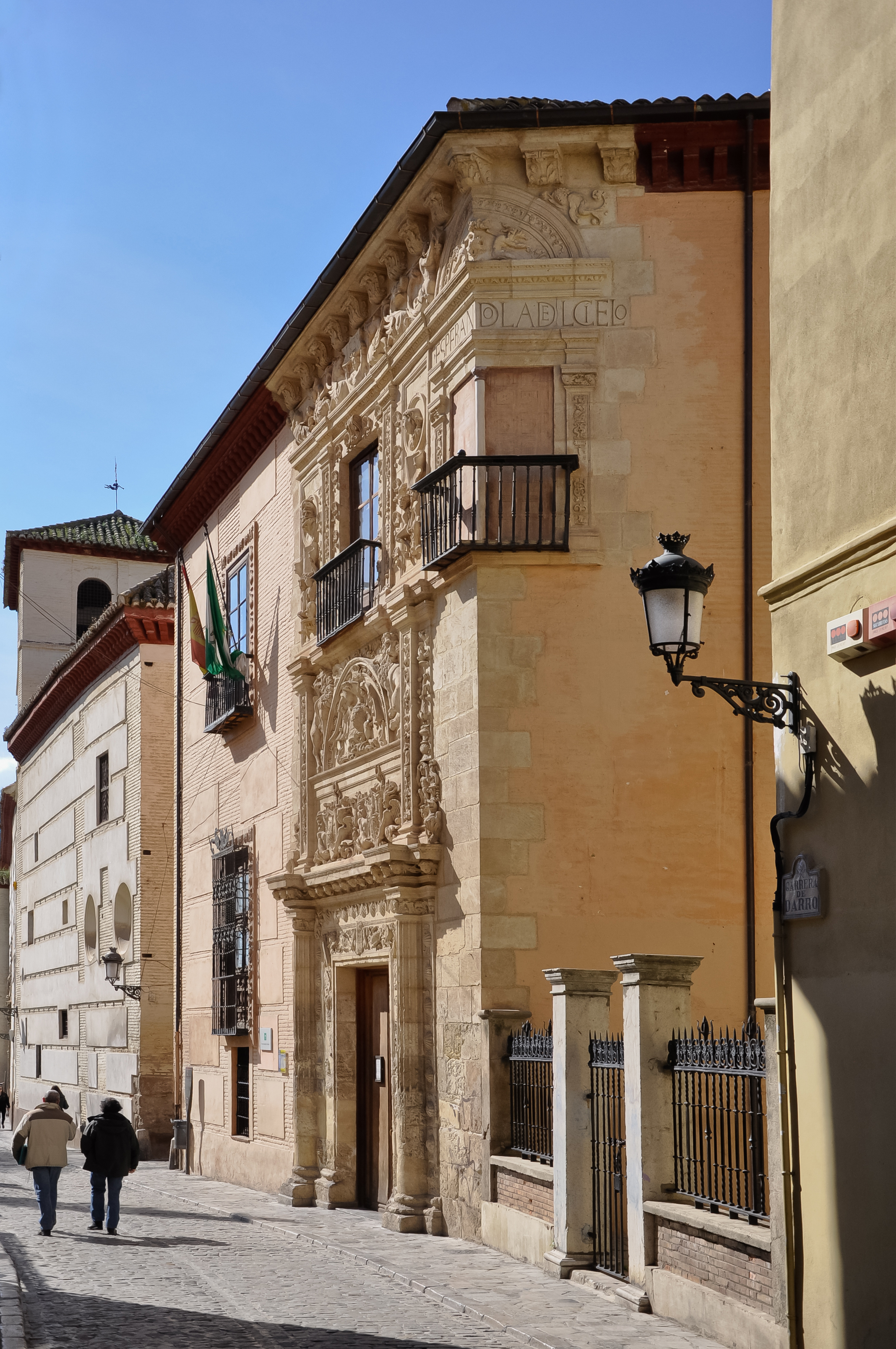 Casa de Castril (archeologisch museum) in Granada, Spanje.